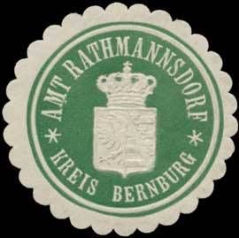 Sealing stamp Title: Amt Rathmannsdorf Kreis Bernburg Description: grün, weiß, geprägt Place: Rathmannsdorf size: 4 cm